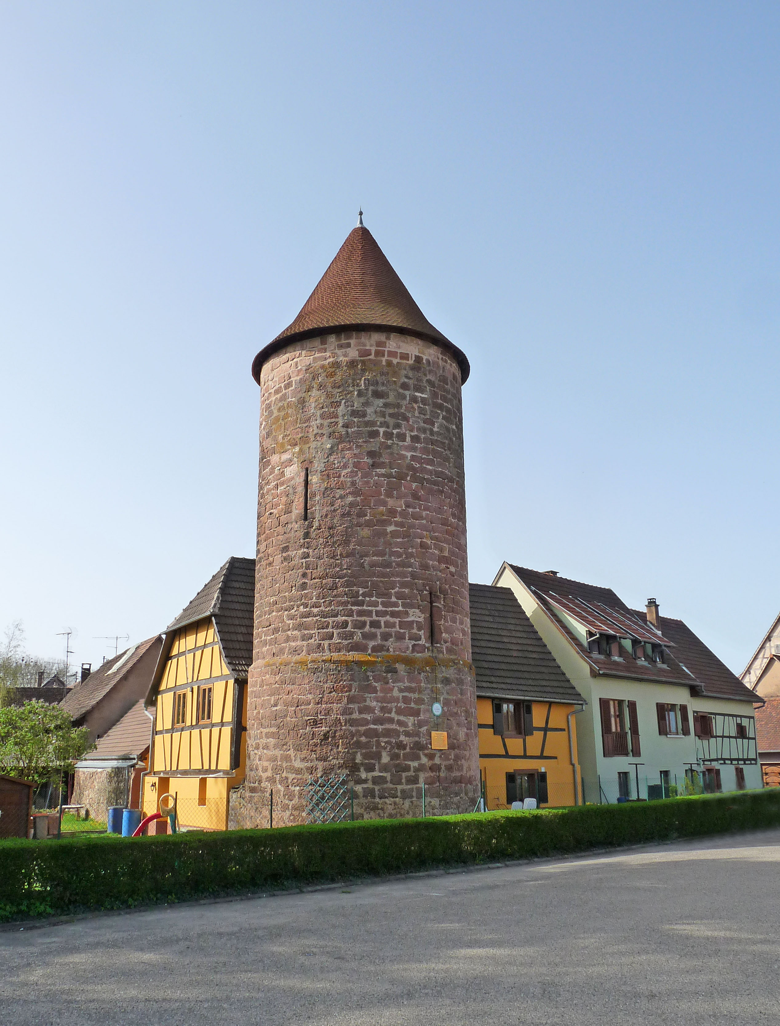 Tour des Suédois à Reichshoffen (Bas-Rhin). Altitude : 178 m. Construction au XIVe-XVe s. Restauration en 2007.